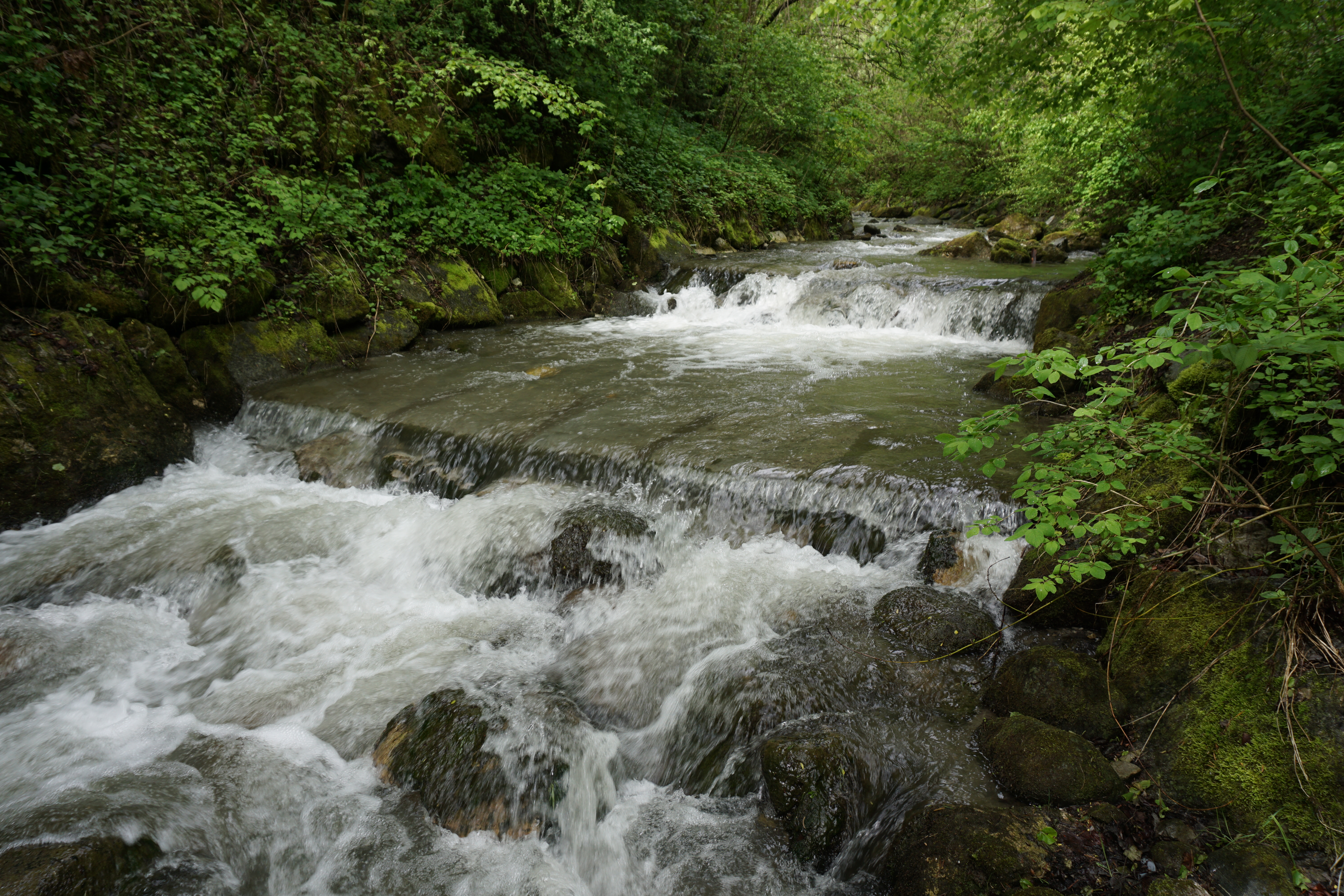 Axamer Bach beim Eingang ins Nasses Tal, am Ortsende von Völs